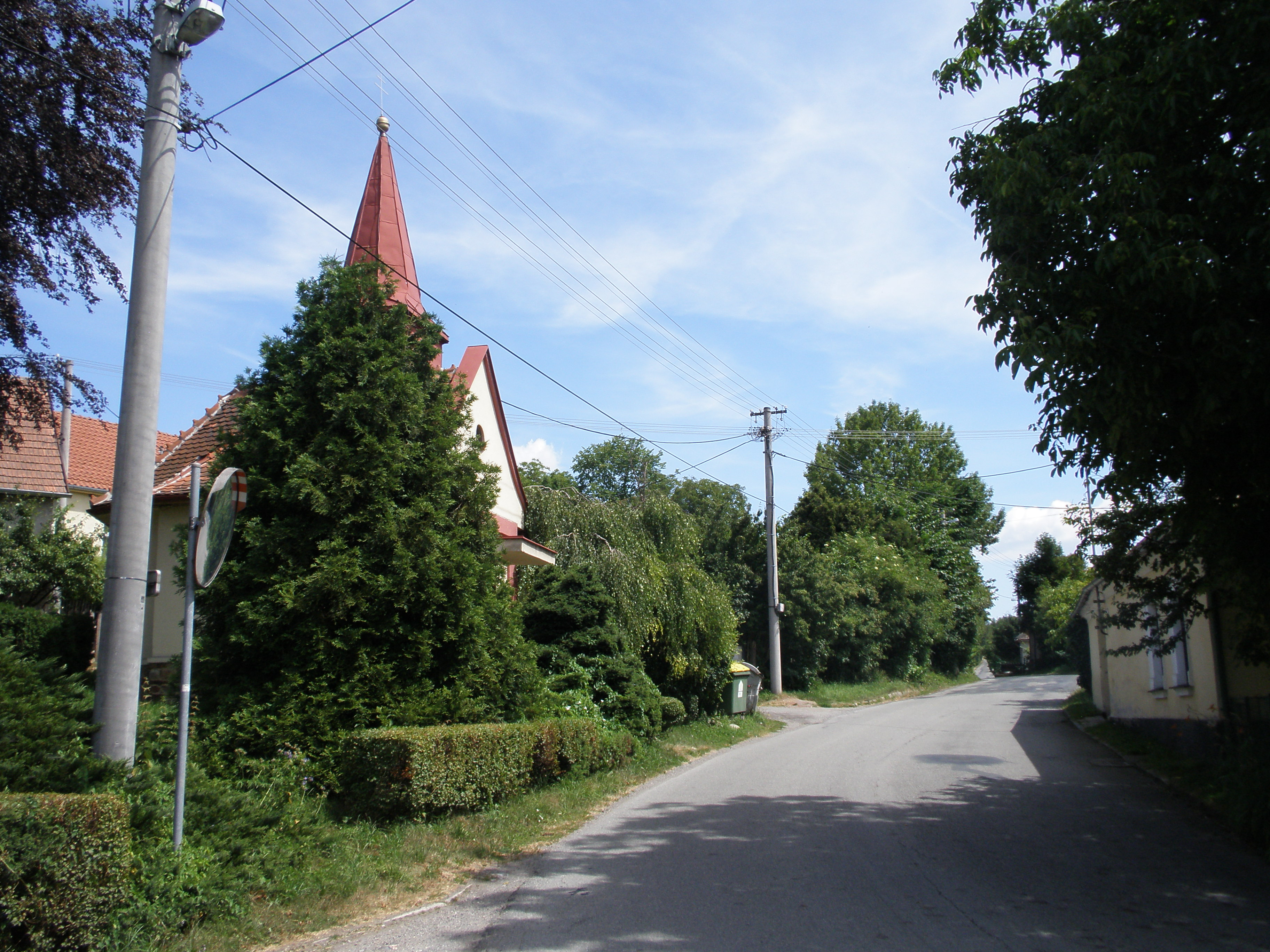 Kaple ve vesnici Svárov, která je součástí města Velké Opatovice